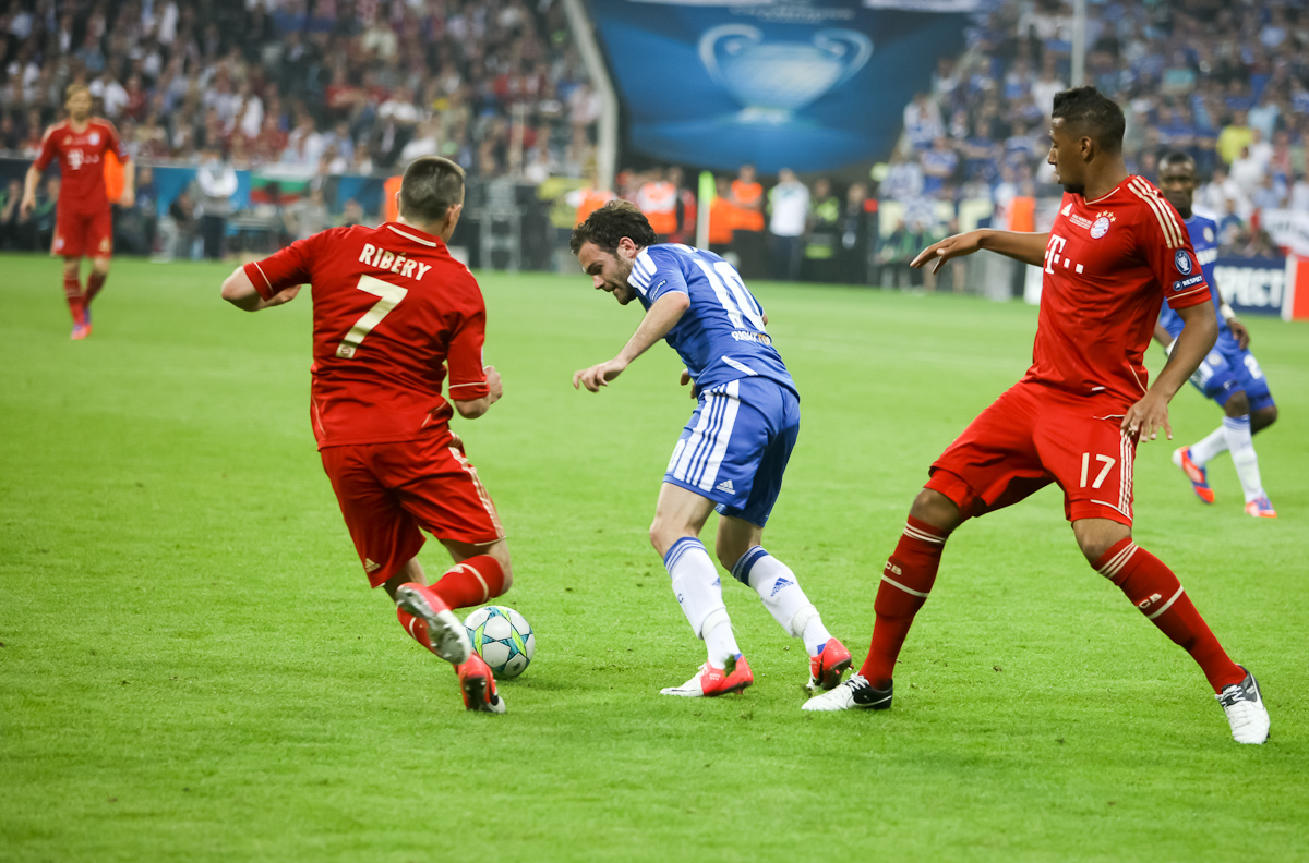 RA1_6139